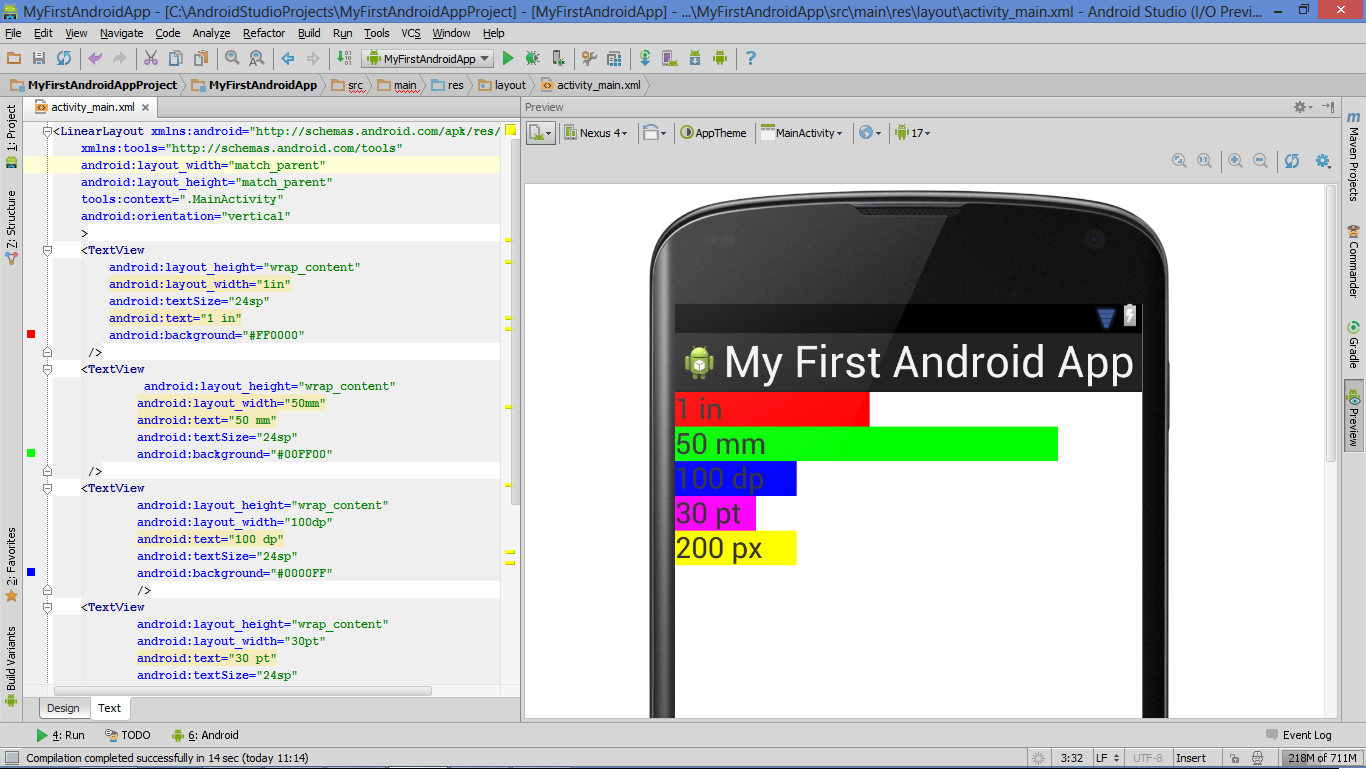 Sammenligning av DP, pt, px, mm og in